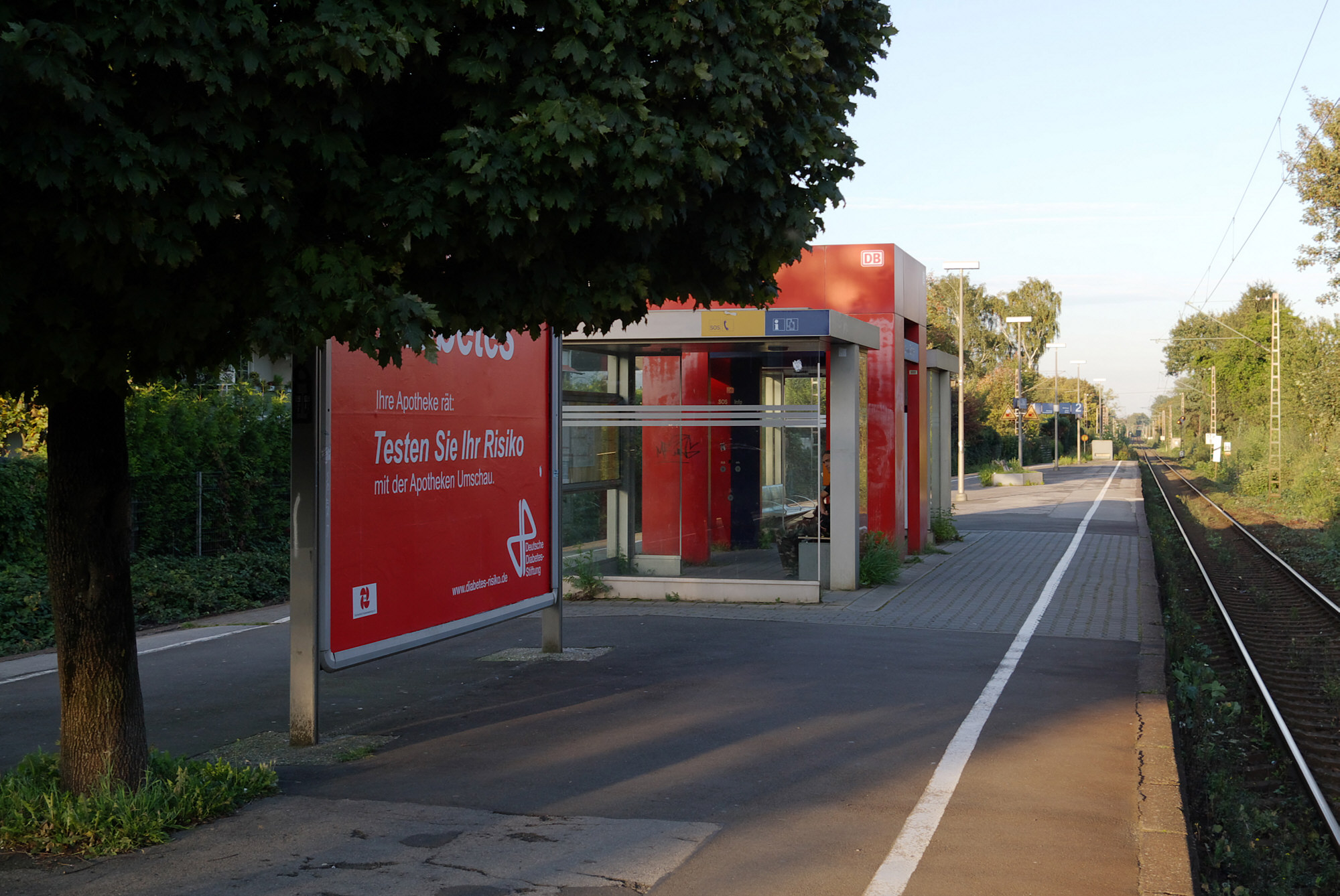 Bahnhof Dortmund-Sölde